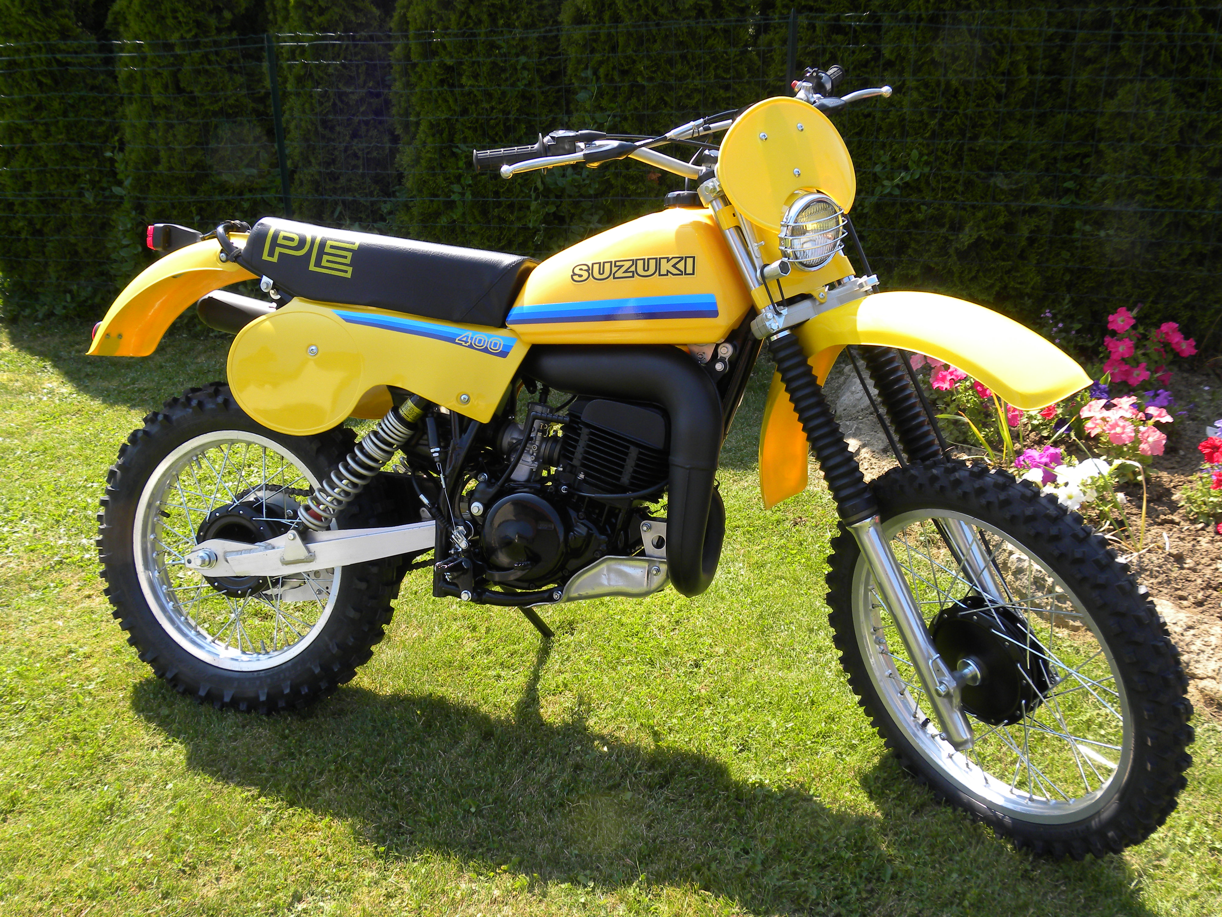 photo de ma suzuki PE400 T restaurée